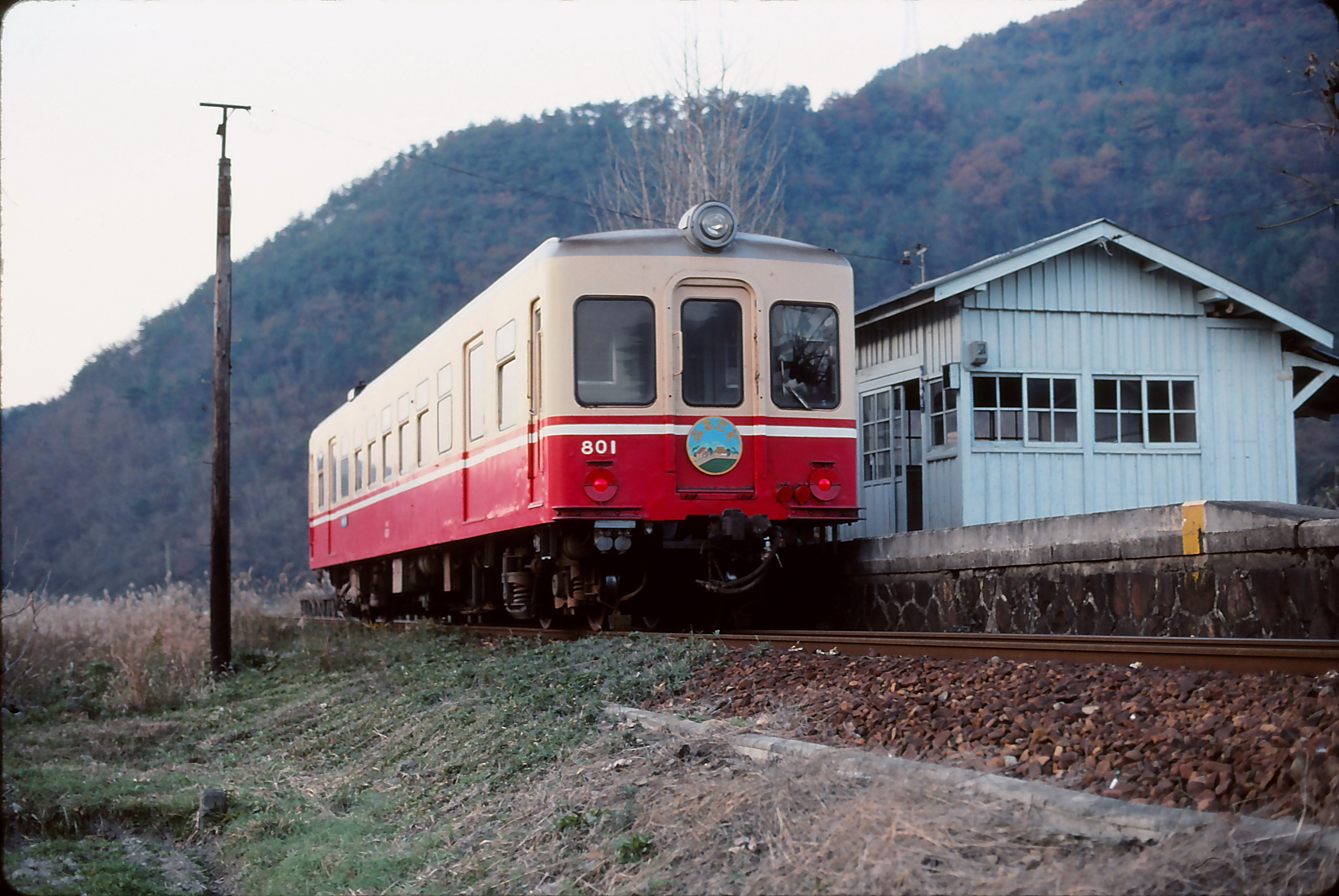 同和鉱業片上鉄道 中山駅